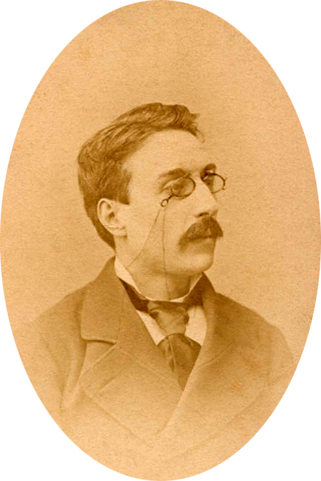 O escritor Eça de Queirós em 1868 (circa).